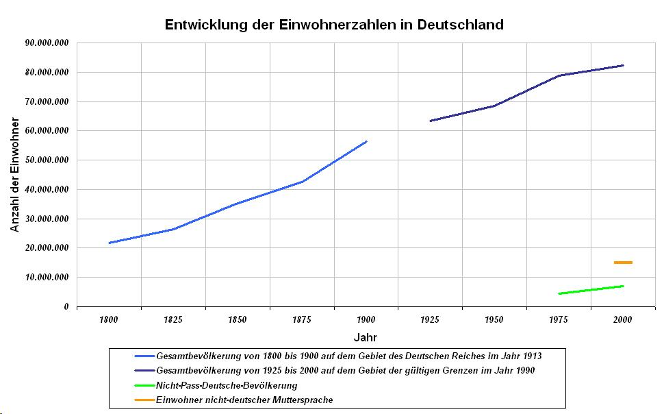 Entwicklung der Einwohnerzahlen in Deutschland